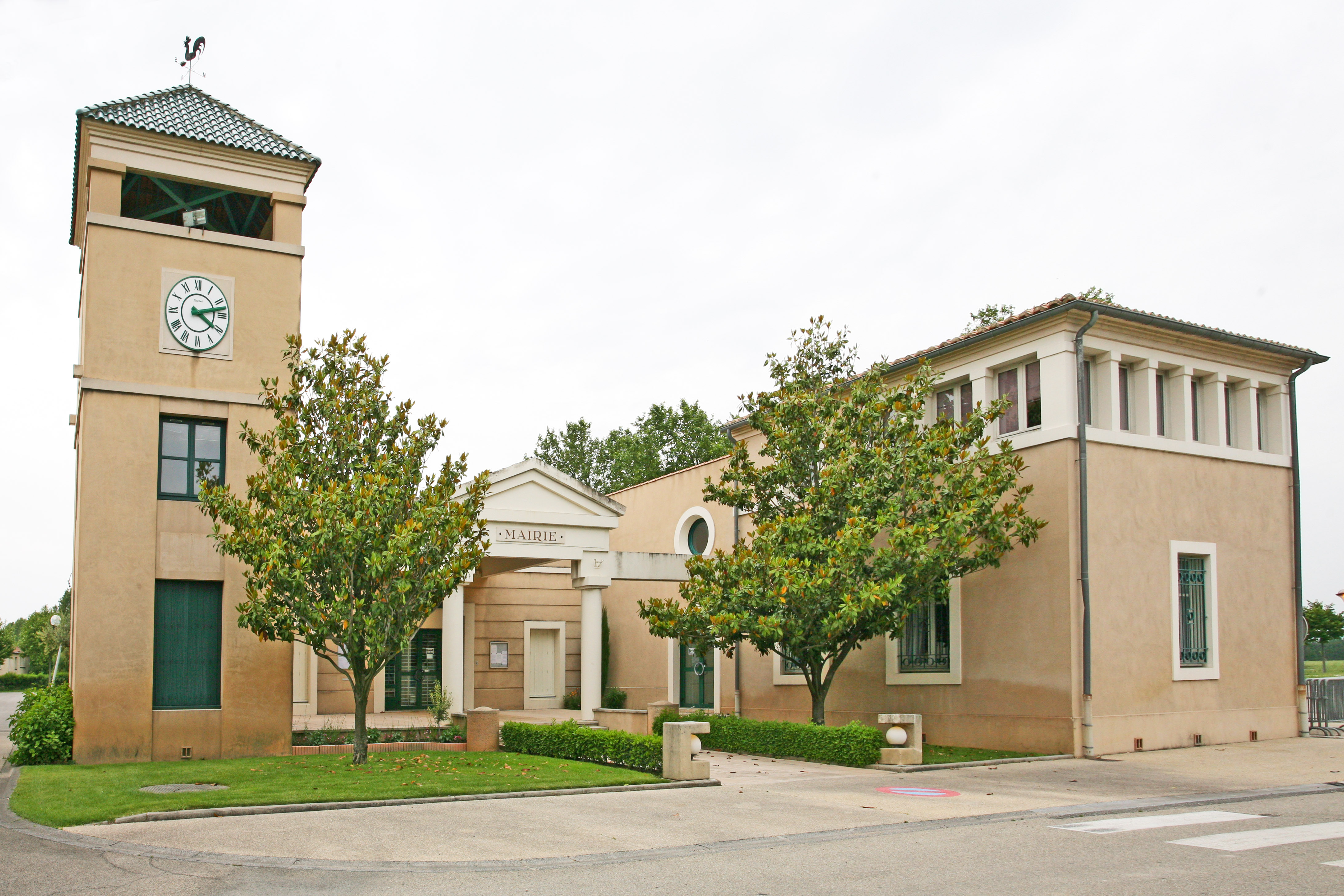 La mairie de Lamotte-du-Rhône (commune de Vaucluse)